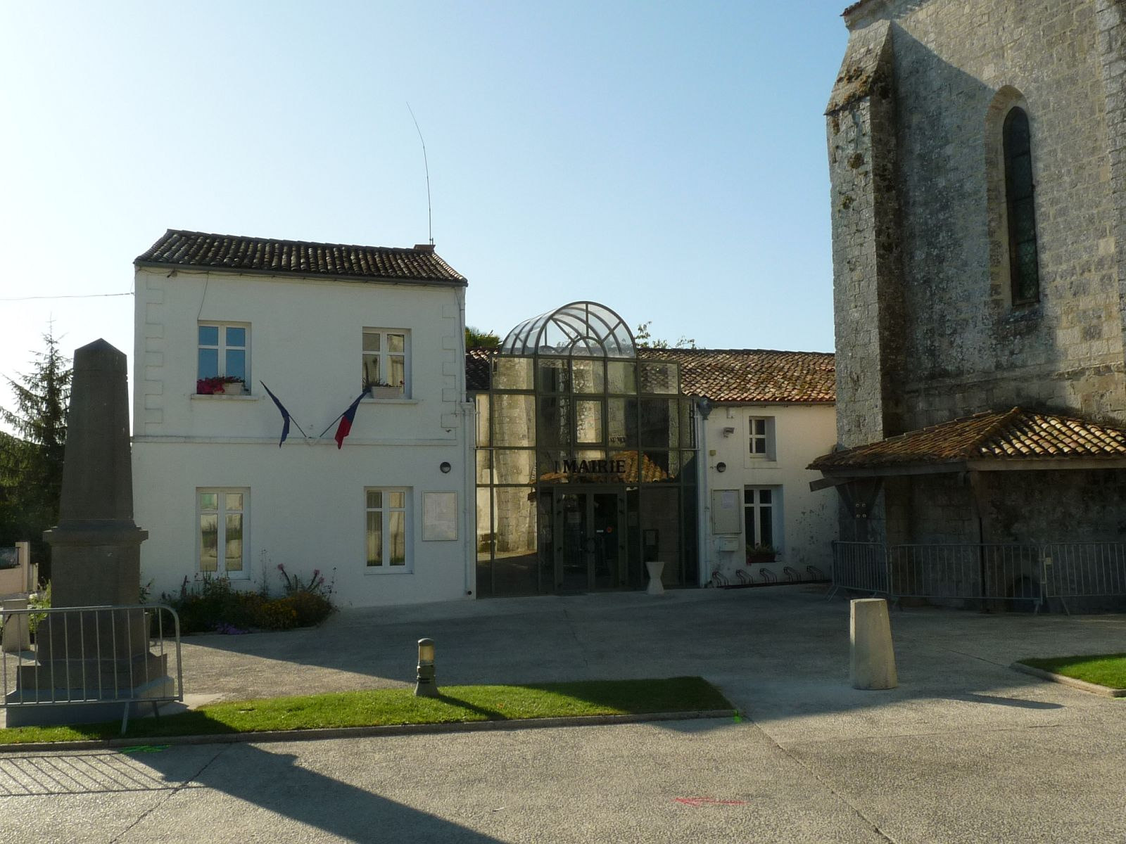 mairie de Médis (17), France.